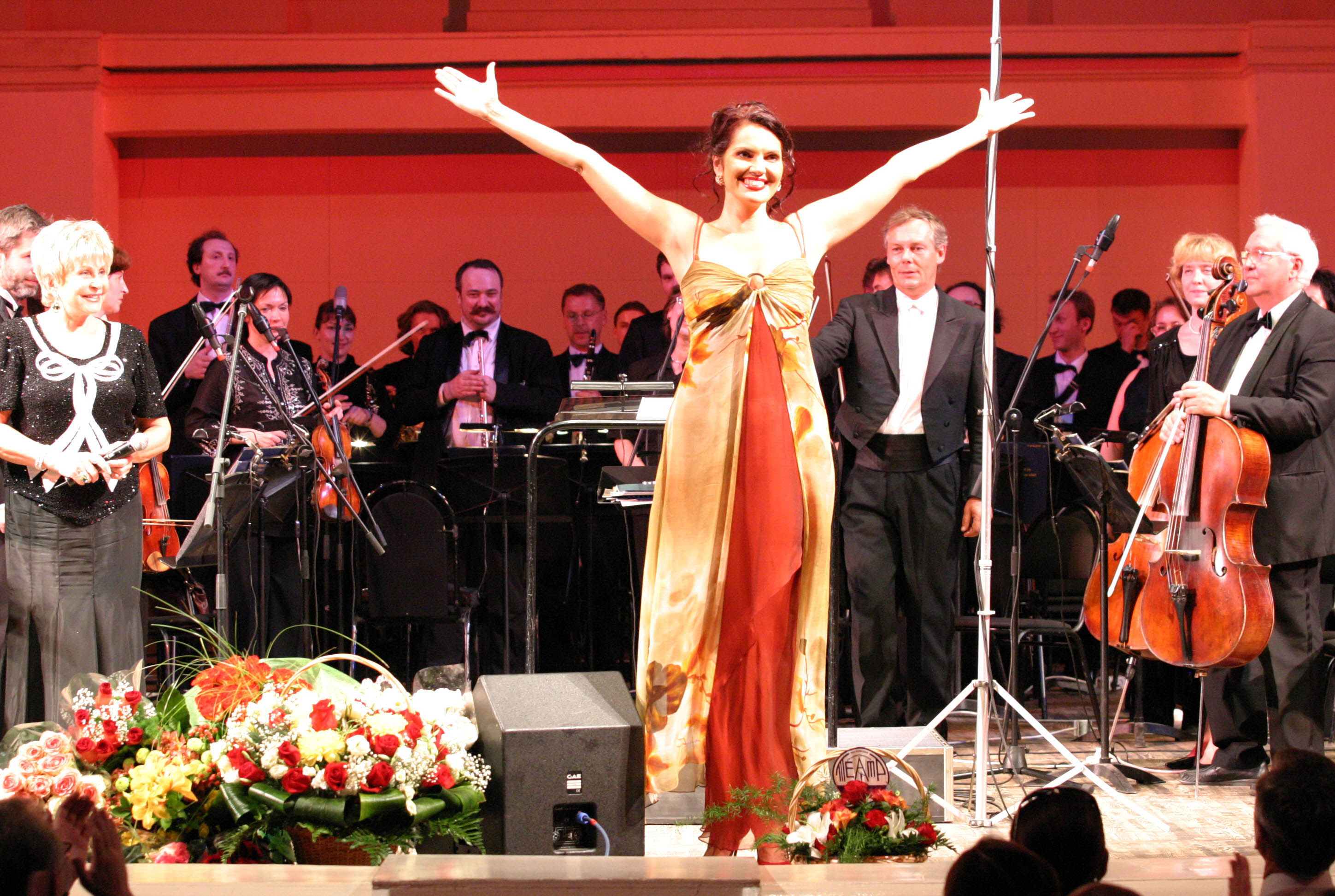 Заслуженная артистка России певица Нина Шацкая, Концертный зал им.Чайковского